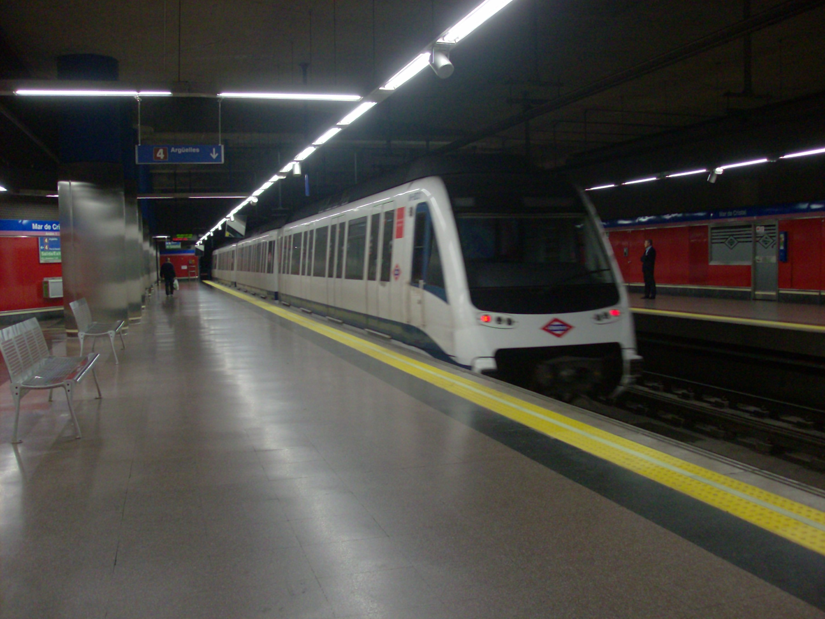 Una unidad de la serie 8000 en la estación de Mar de Cristal (L8)